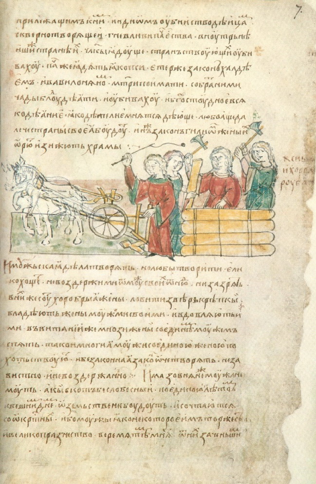 Радзивилловская (Кёнигсбергская) летопись.